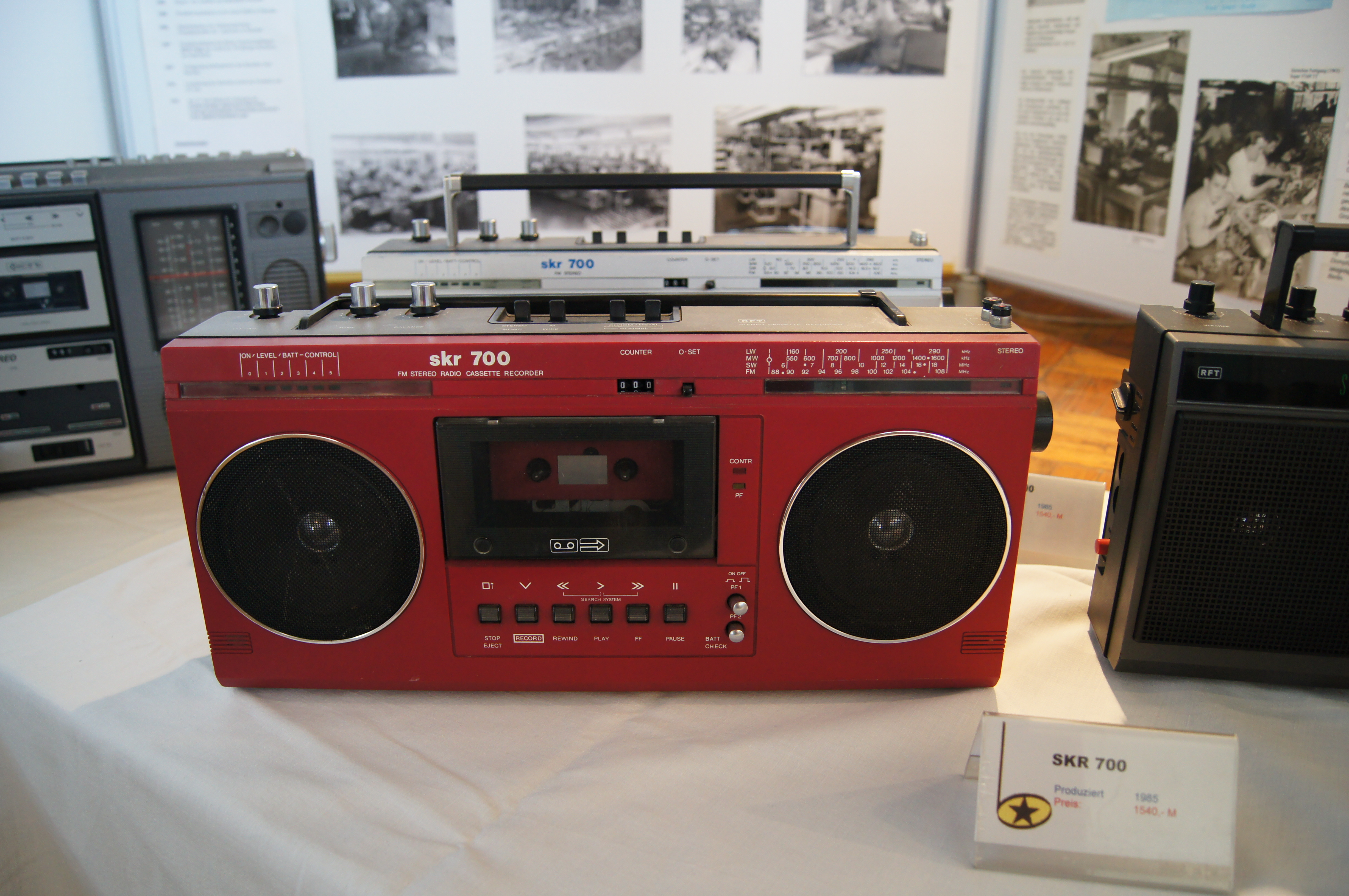 Kombinat